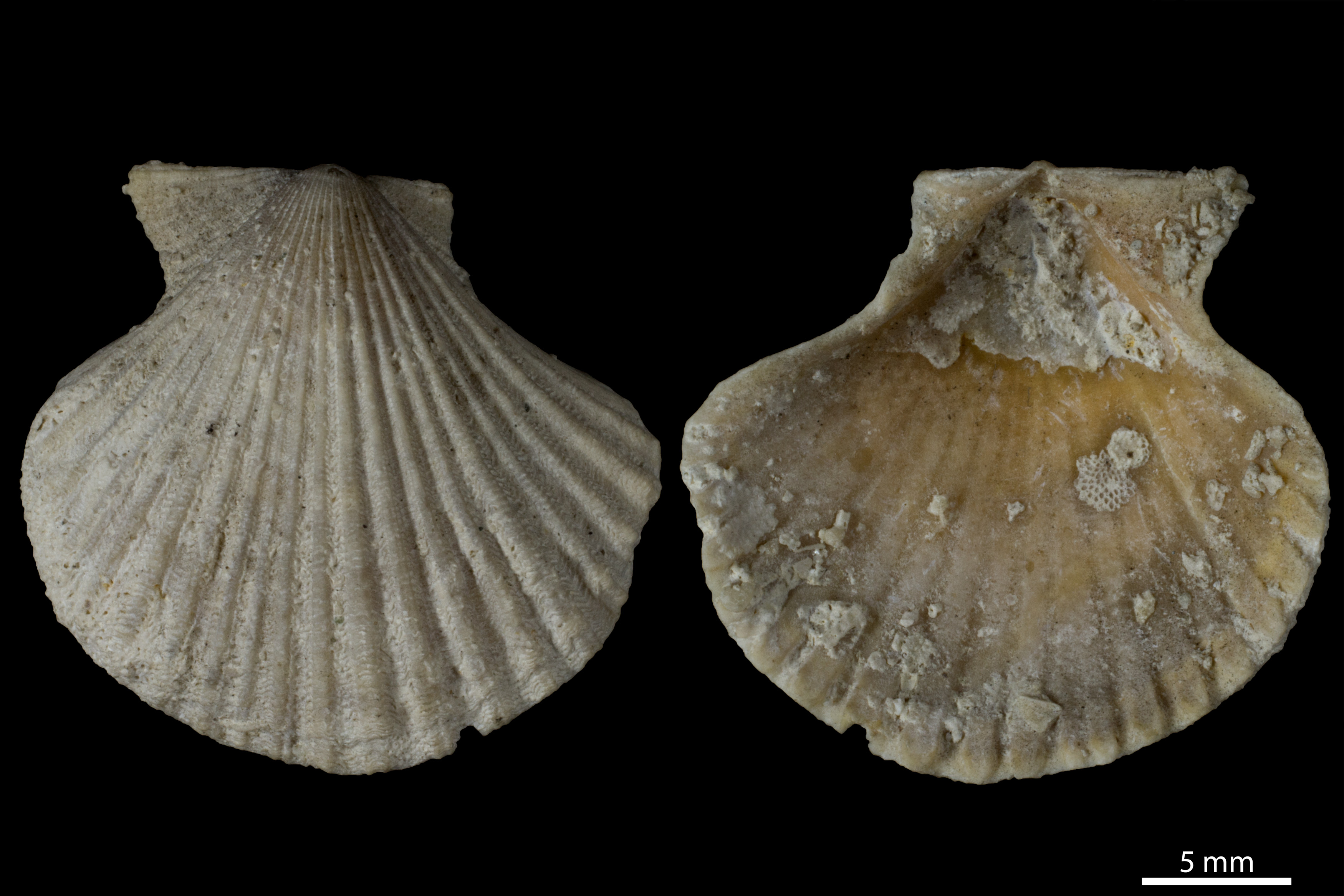 Fossile de "Chlamys gregoriensis"